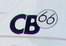 CB66 Racer sail emblem Picture taken by: Liv Juhl Jacobsen. Hellerup, Denmark. November 2006.